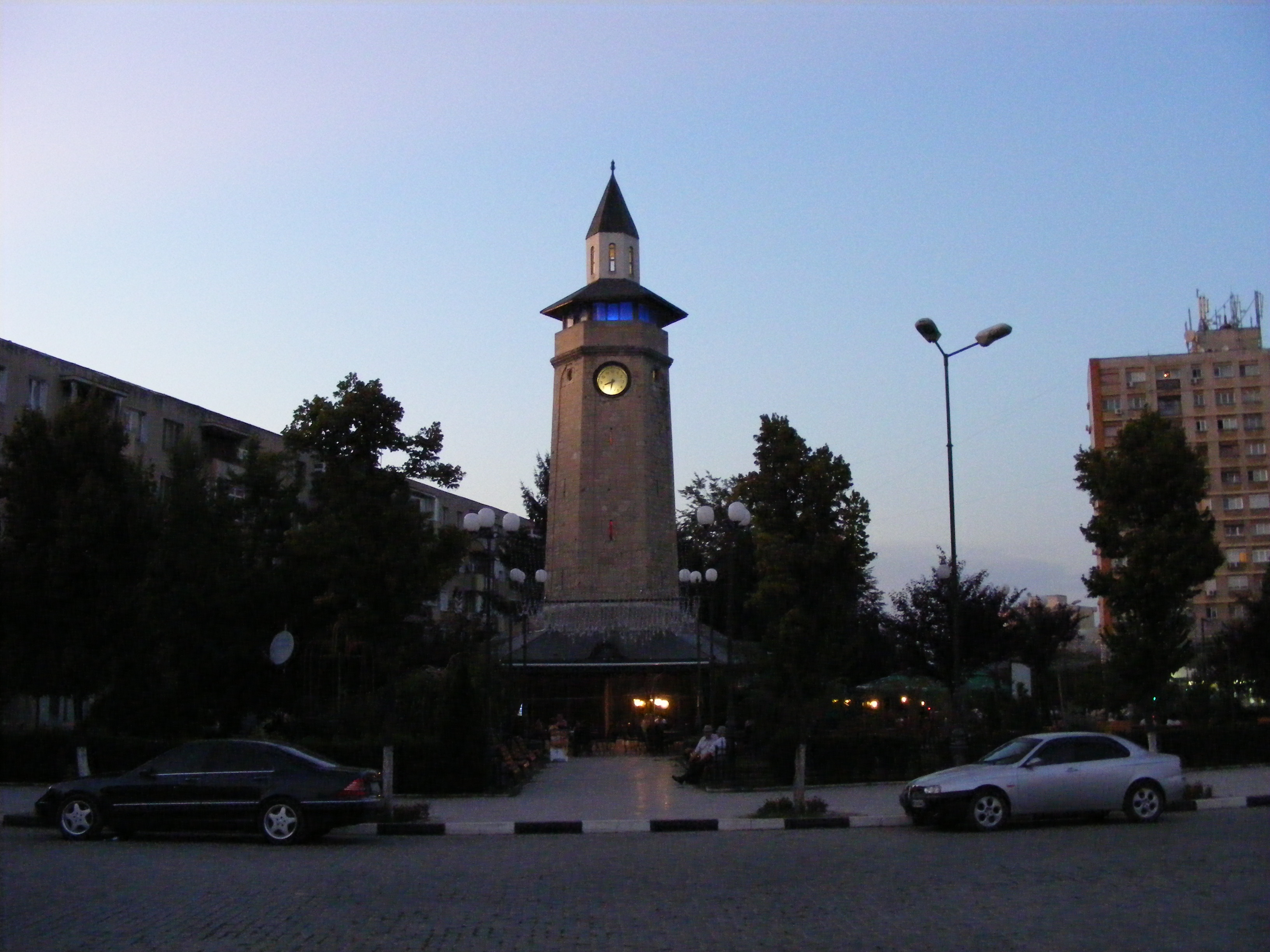 GR-II-m-A-14913